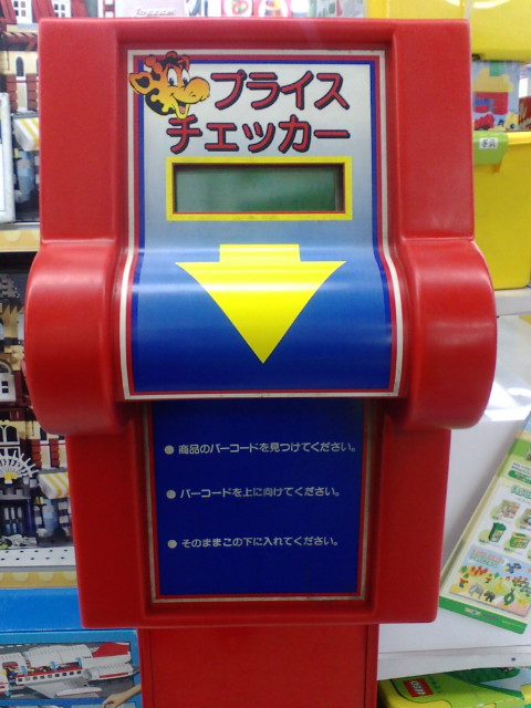 トイザらスにて。結構値札はがれてるのが多いので便利 トイザらスのプライスチェッカー